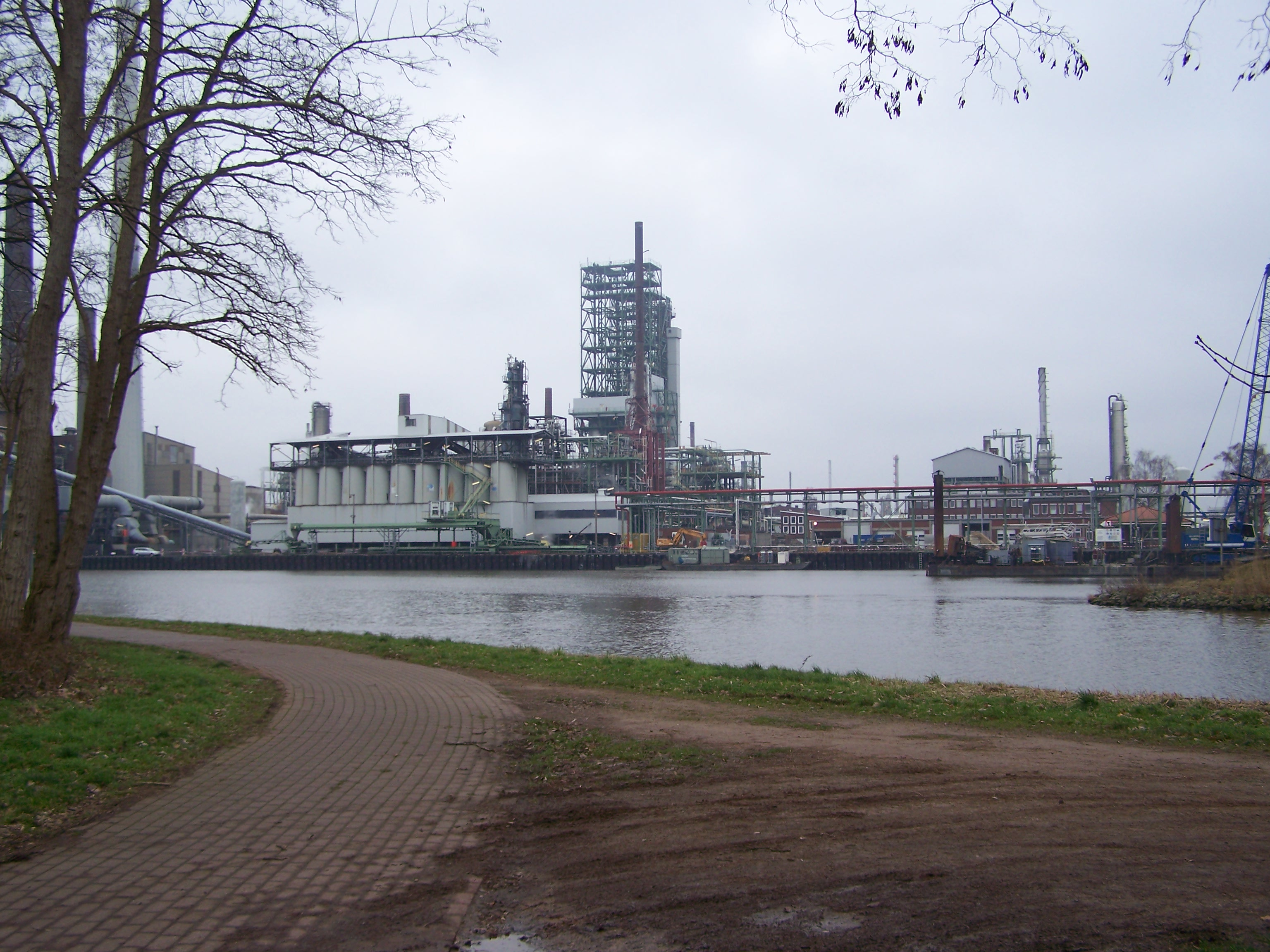 Bild der ERE-Erdöl-Raffinerrie EmslandAnsicht: Blick von Holthausen Rechts neben der Brücke über dem Dortmund Ems Kanal